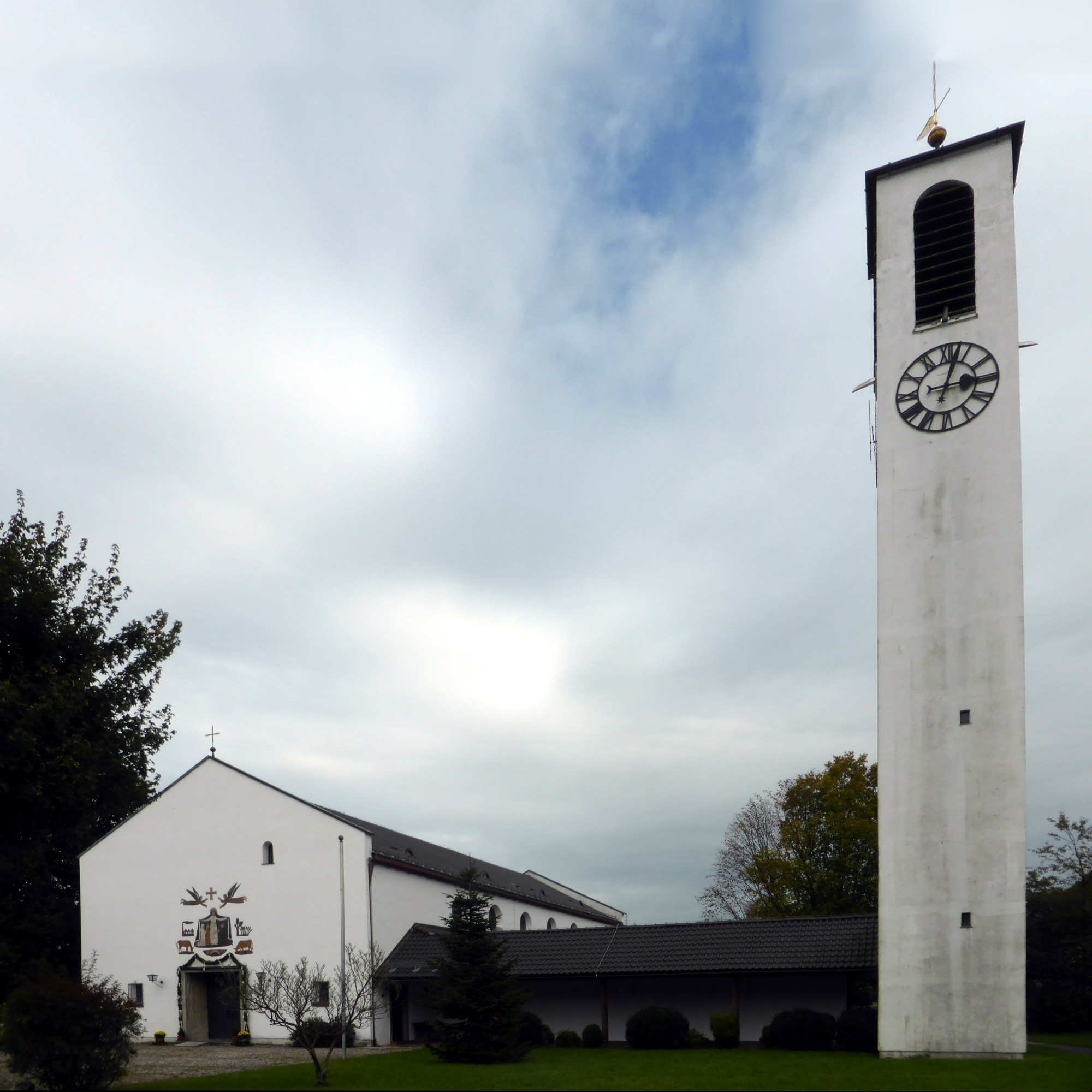 Korbinianskirche in Heufeld, Markt Bruckmühl